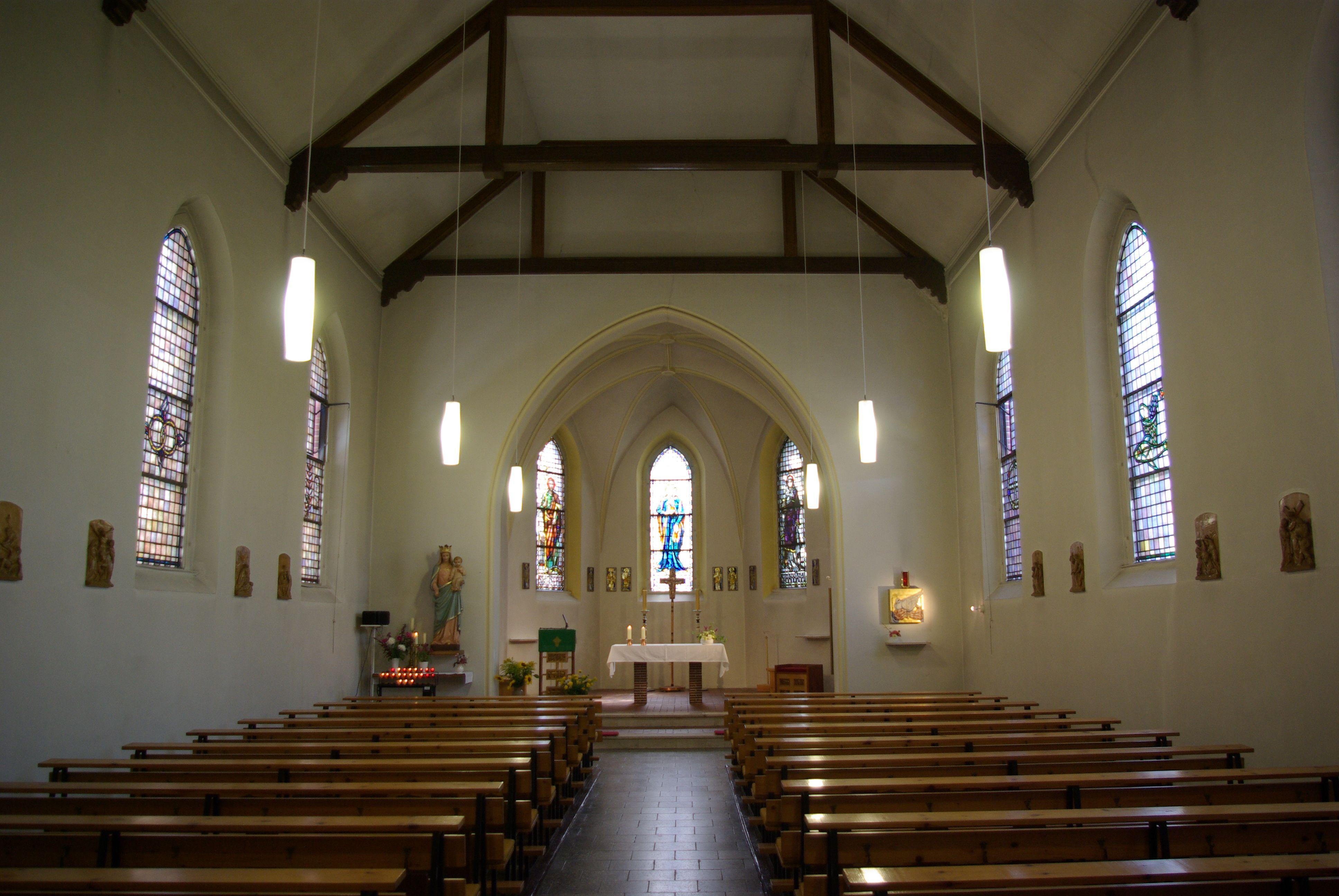 Jüterbog in Brandenburg. Die katholische Kirche steht unter Denkmalschutz. Die Kirche entstand 1893. Die Kirche ist auf einem Hof an der Großen Straße.